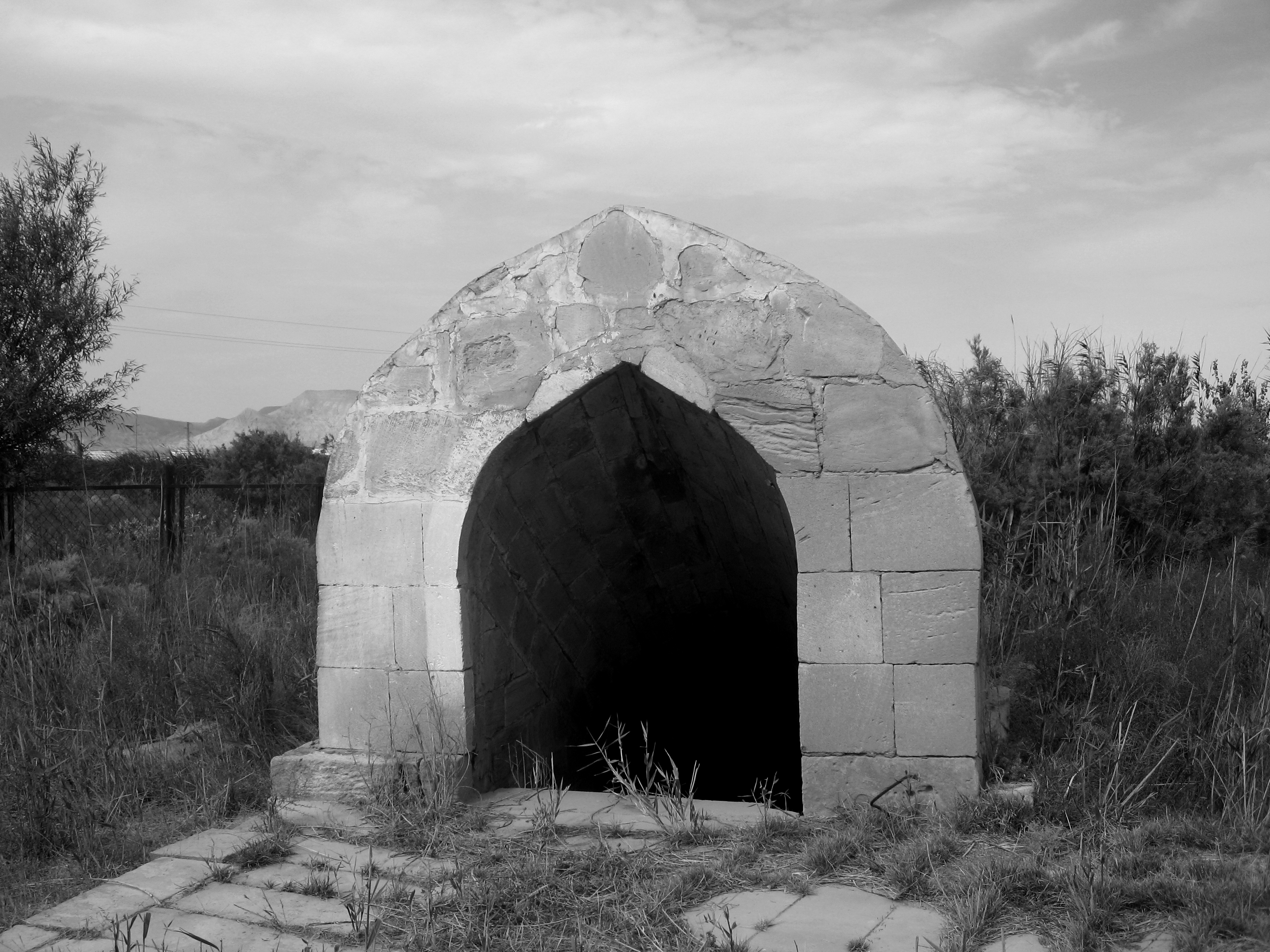 1-ый овдан Сангачальского караван-сарая